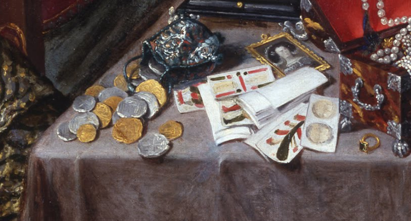 La obra representa a un caballero del siglo XVII vestido con la indumentaria de la época y dormido mientras un ángel le muestra el carácter efímero de los placeres, las riquezas, los honores y la gloria. El ángel le muestra el jeroglífico de la fecha sobre el sol, que hiere, vuela raudo y mata. El conjunto de objetos situados sobre la mesa constituye un auténtico bodegón en el que se establece una condensación de símbolos y alegorías. Los símbolos de la mesa son muy complejos, pero destacan algunos por su presencia continua en todas las "vanitas": la calavera que simboliza la muerte, la máscara de teatro sobre la hipocresía, las joyas y el dinero que son las riquezas que no podemos llevar al otro mundo, la baraja y las armas como el juego y los placeres de la caza, el reloj que indica el paso inexorable del tiempo, la vela apagada que indica la extinción de la vida... son innumerables los objetos y los múltiples significados engarzados que podemos entresacar de todos ellos. El pintor ha representado un "corpus" de los objetos de la vanidad del mundo y de su sin sentido tratados con una definición magistral que los individualiza como forma de acentuar, a través de lo real, la presencia de su carácter didáctico, alegórico y moral.